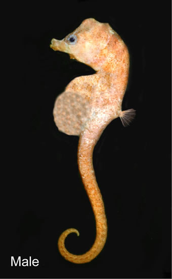 Hippocampus minotaur. Holotipo. Macho. Autor: Martin Gommon